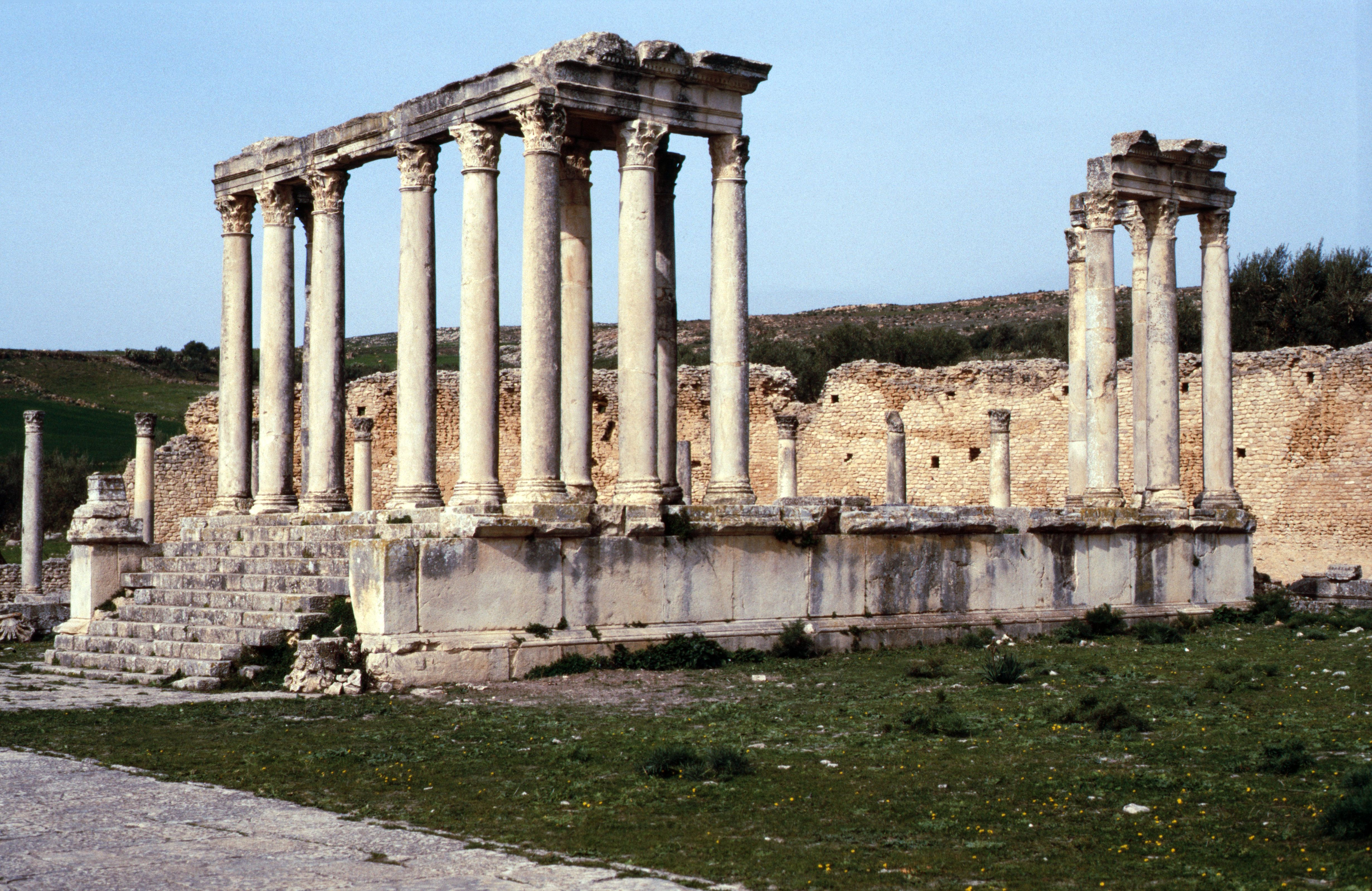 Tempel der Juno Caelestis 1988